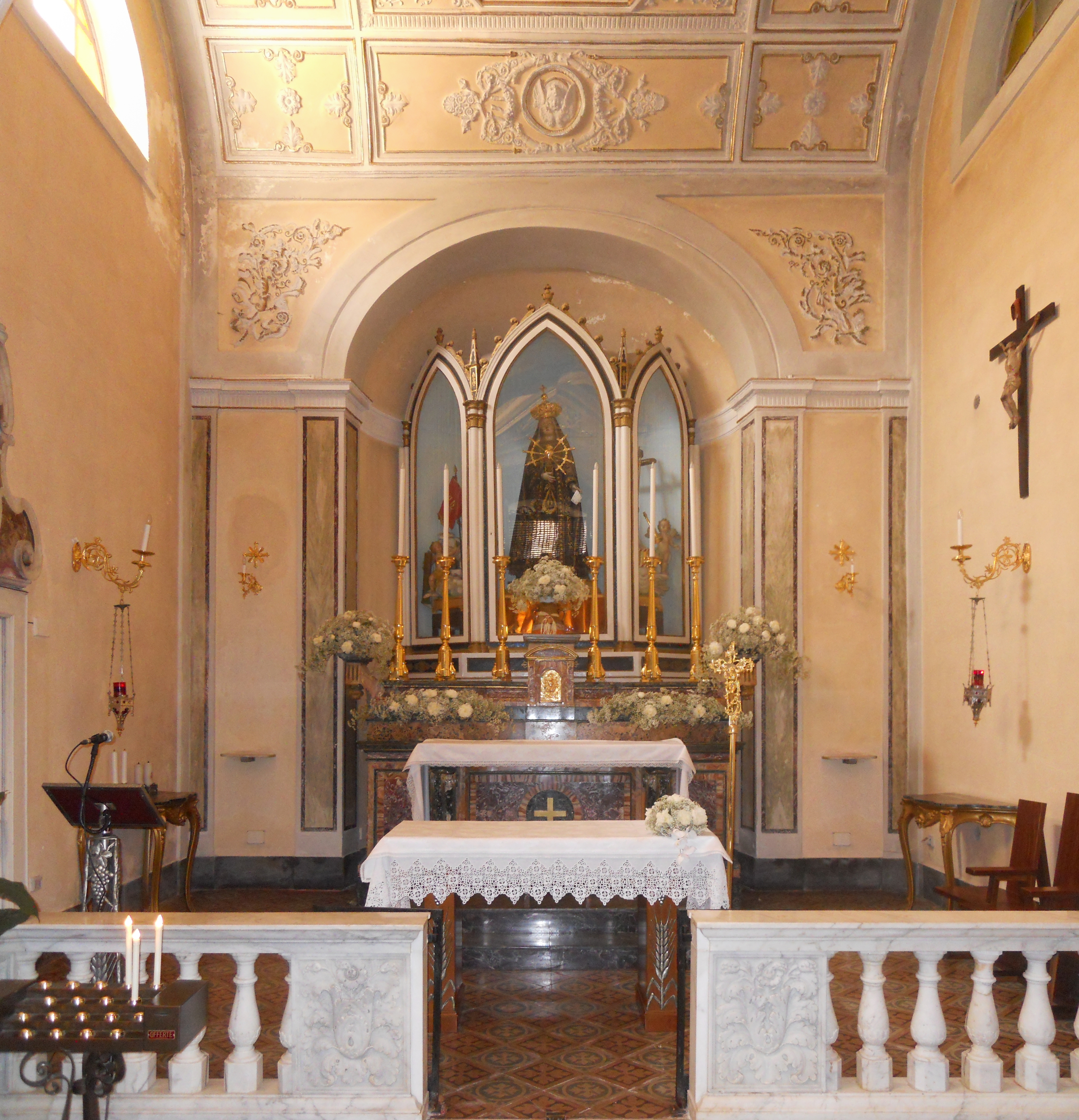 Il presbiterio della chiesa della Santissima Addolorata a Gaeta